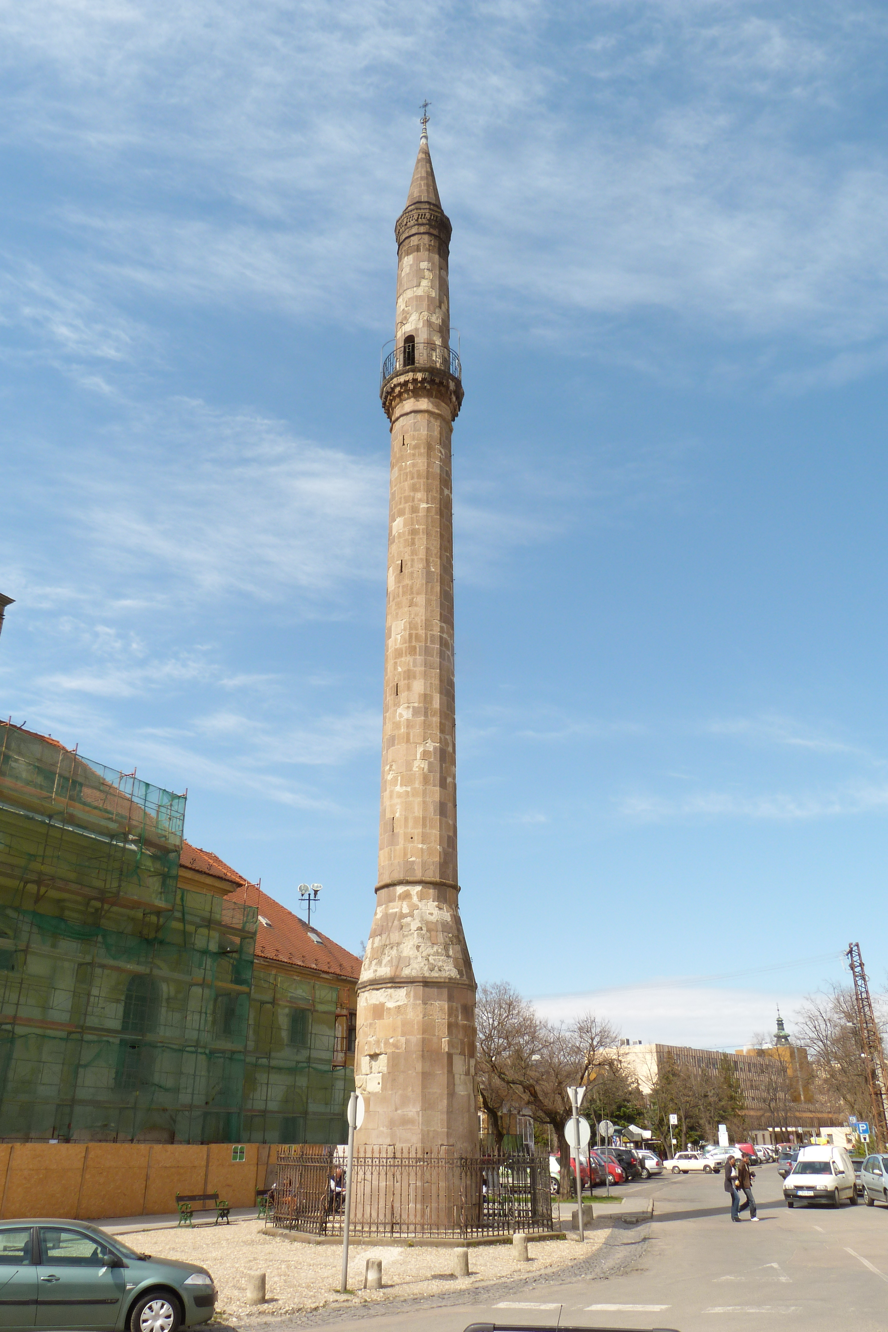 A felvétel 2013. Április 17 –én, szerdán készült Egerben. Forrás: egrivar.hu varbaratikoreger.hu